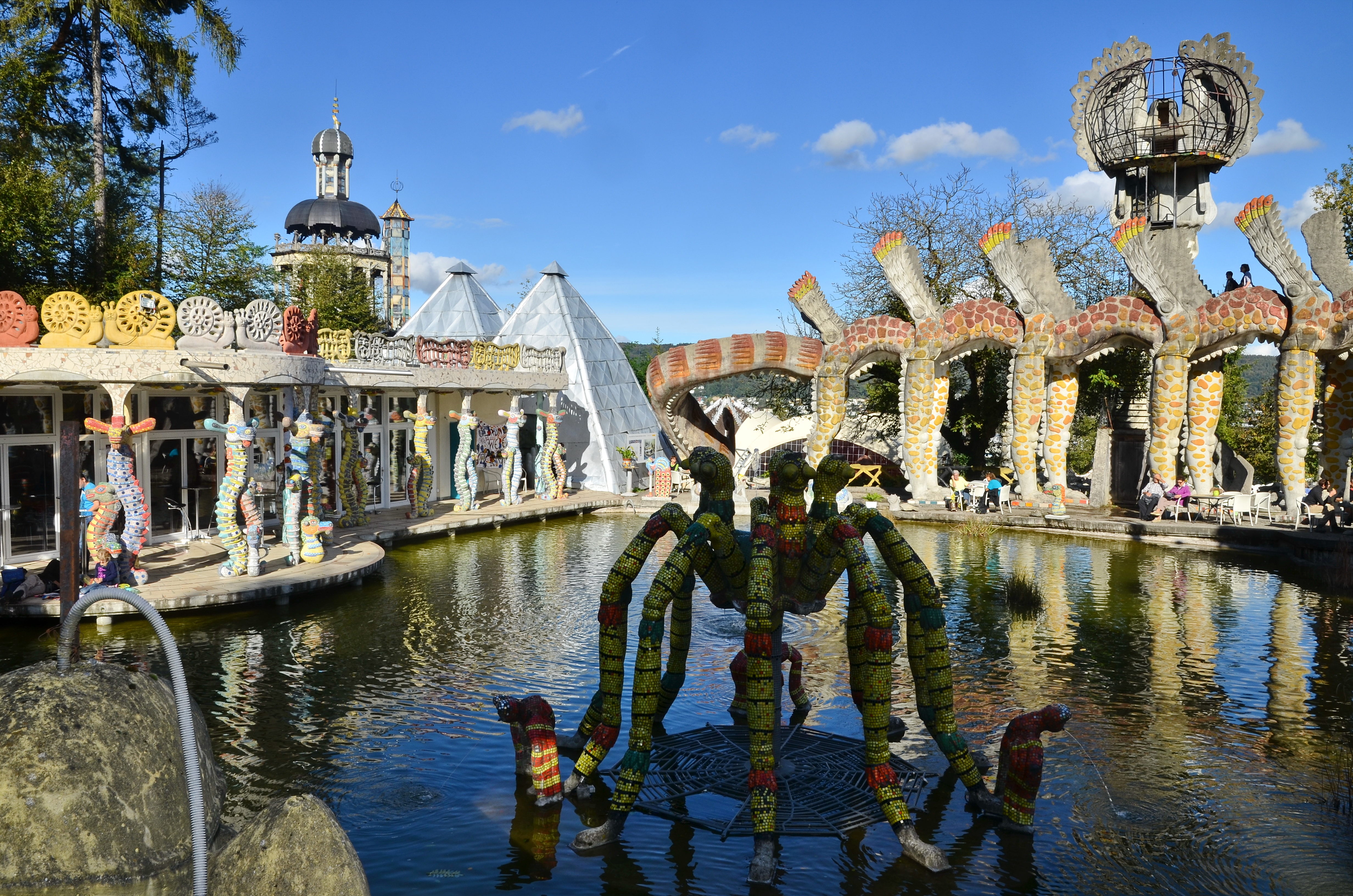 Bruno Weber Park in Dietikon - Spreitenbach (Switzerland)